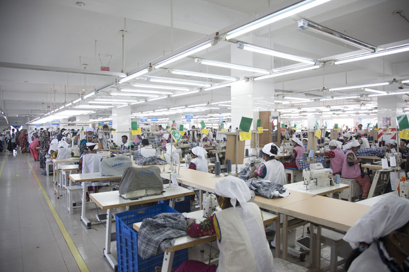 Nassa Group AJ super garments rmg production line